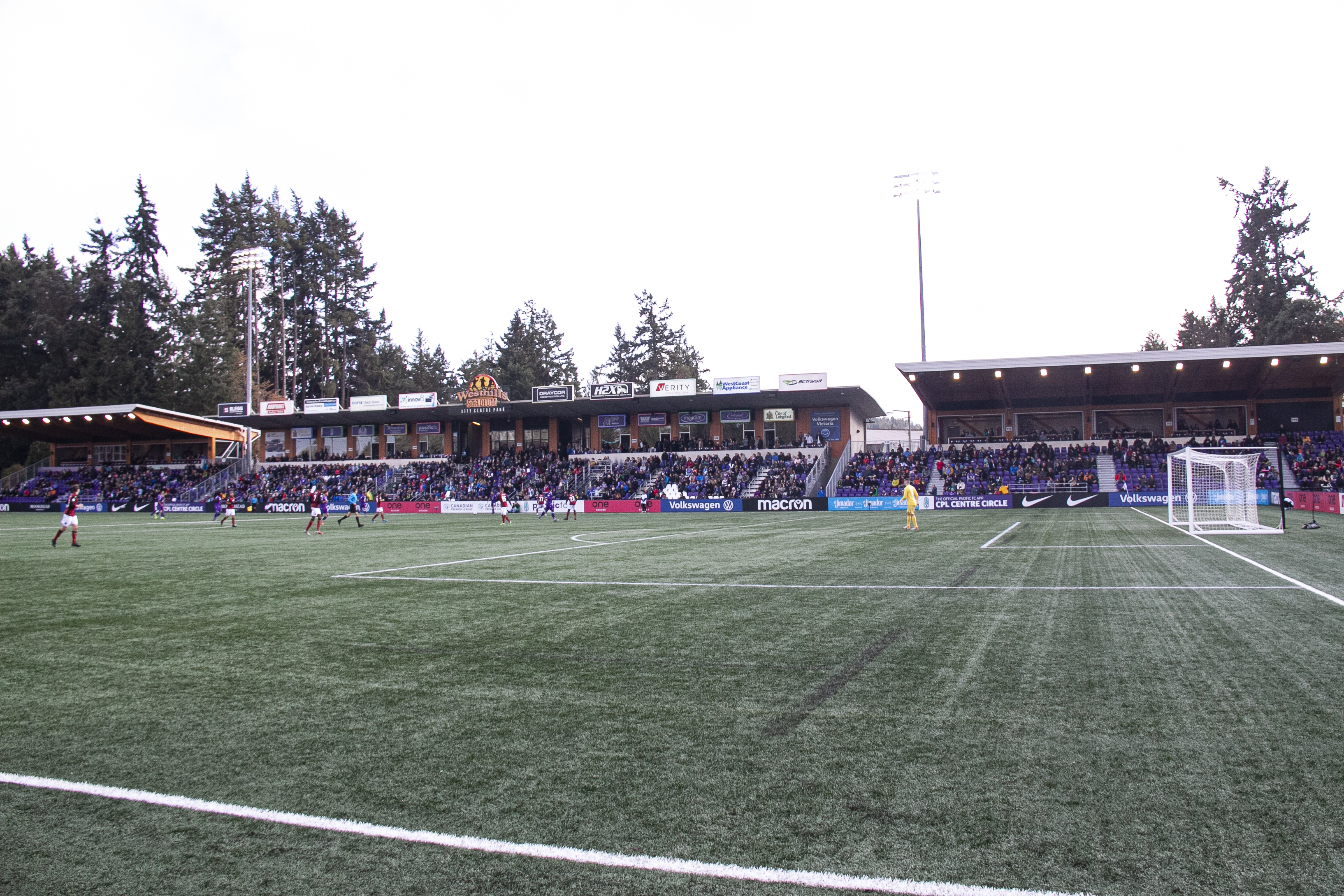 Les tribunes principales du Stade Westhills, à Victoria, C.-B., Canada.